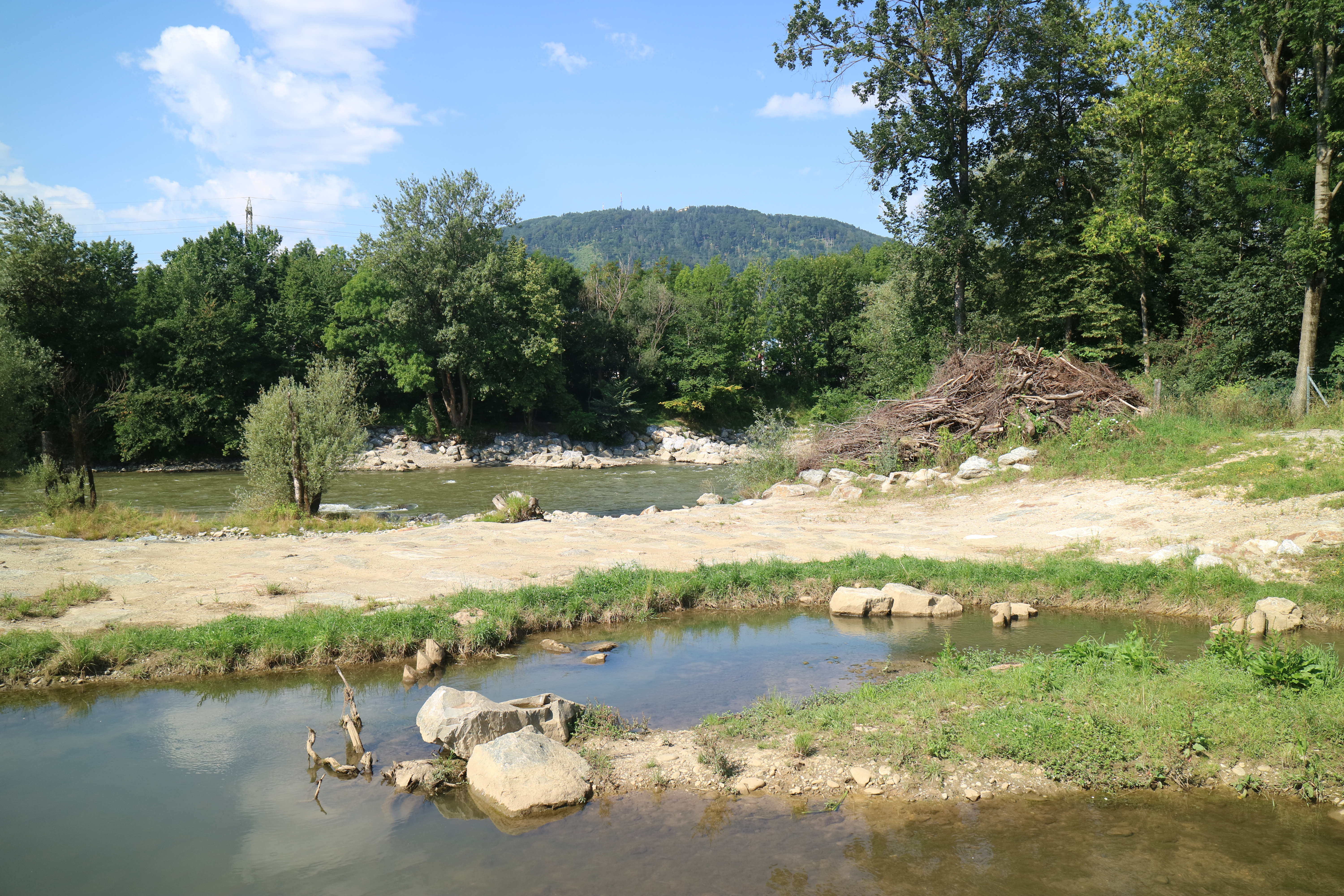 Andritzbach im Vogelschutzgebiet Weinzödl im Grazer Stadtbezirk Andritz, im Hintergrund die Mur und der Plabutsch (Fürstenstand)